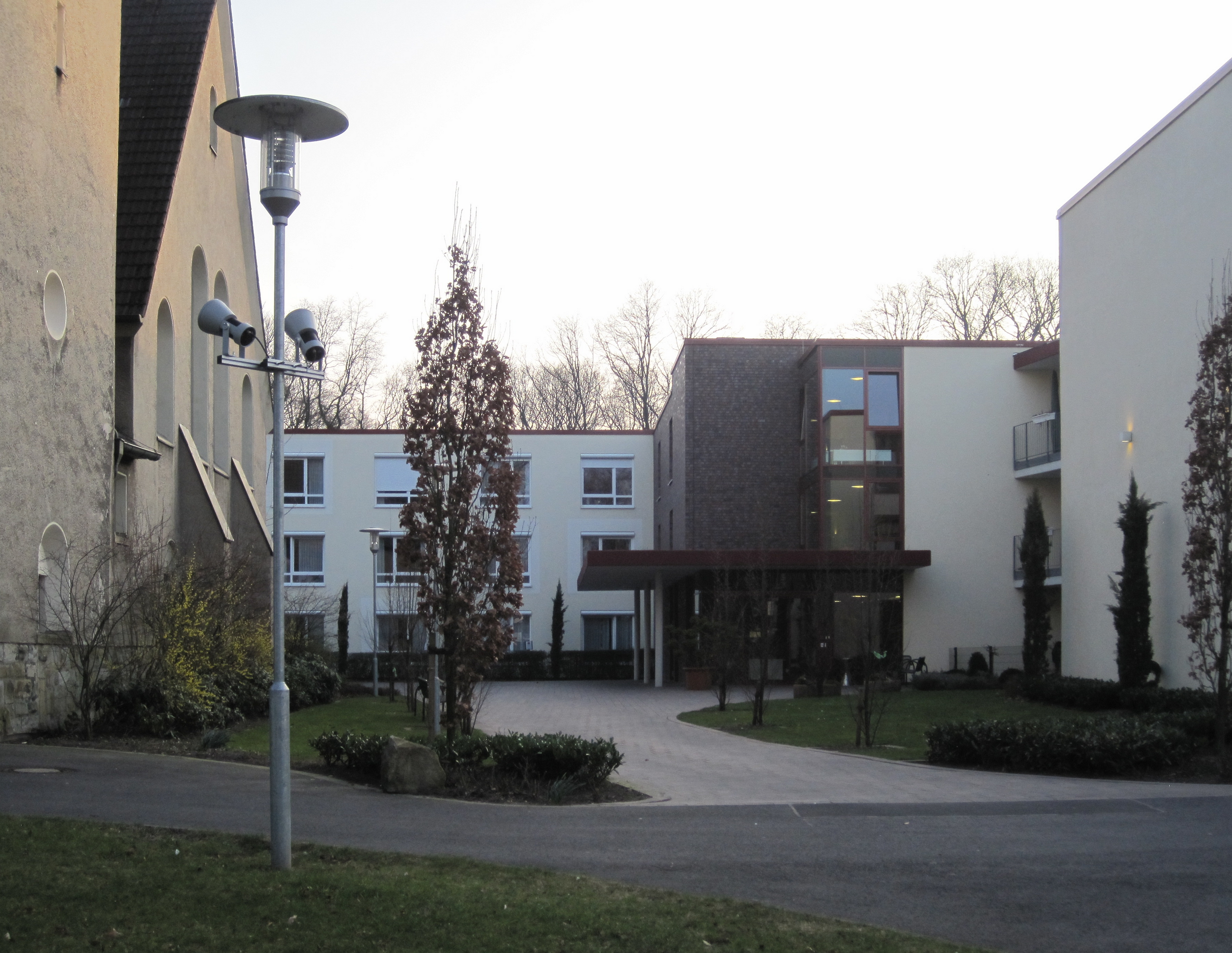 Das Foto zeigt das Altenwohnheim neben der Kreuzkirche Hamm-Bockum-Hövel.